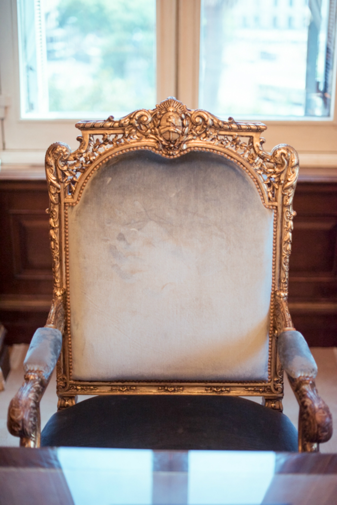 Sillón presidencial de Mauricio Macri